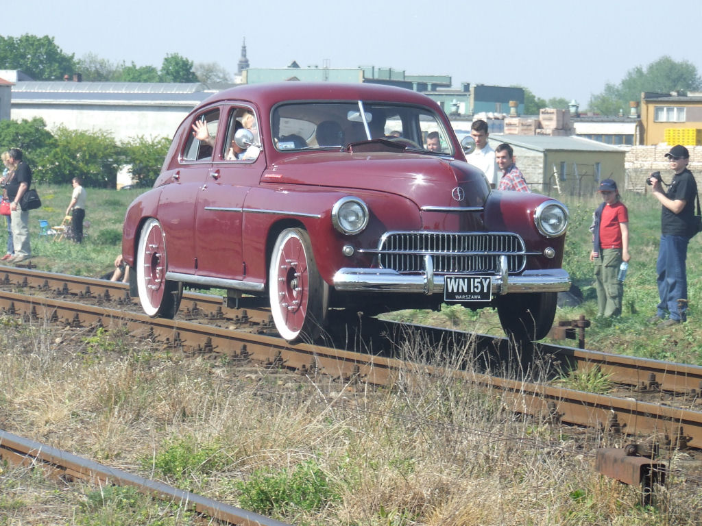 Drezyna - Warszawa 200 prezentująca się podczas XIV parady parowozów w Wolsztynie (samodzielna adaptacja samochodu na drezynę, ze stowarzyszenia Nasz Tor}